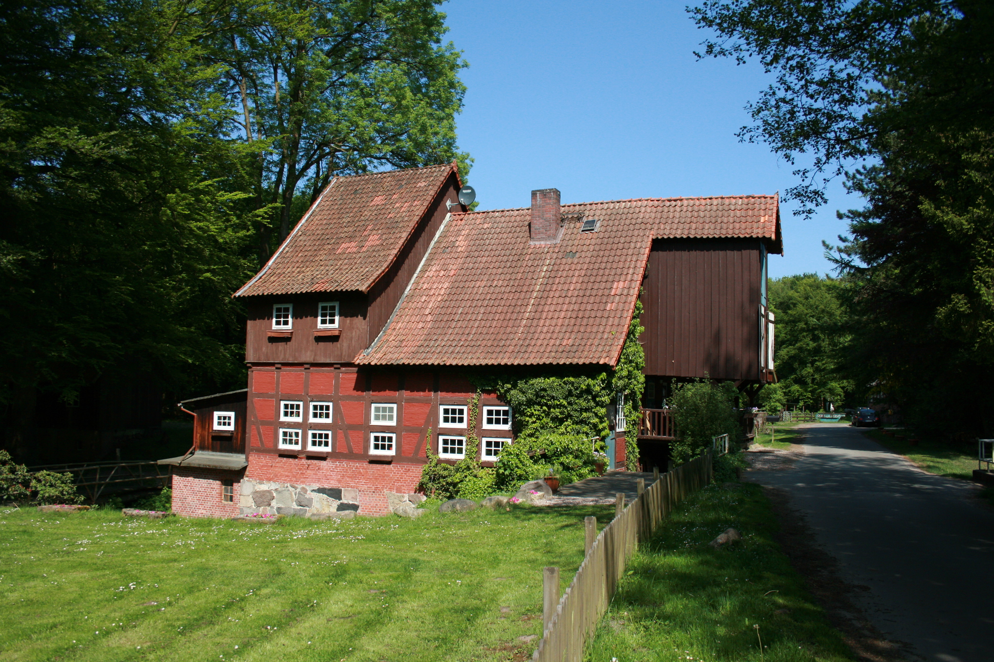 Rutenmühle, Brochdorf, Neuenkirchen (Lüneburger Heide)